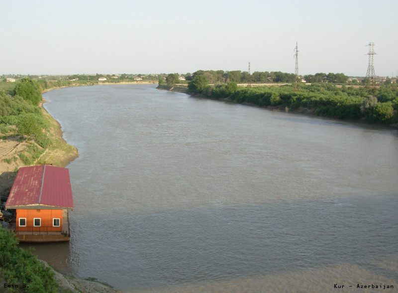 Река Кура, Азербайджан